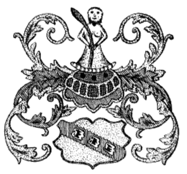 Fru Genetes våben i Harlev Kirke